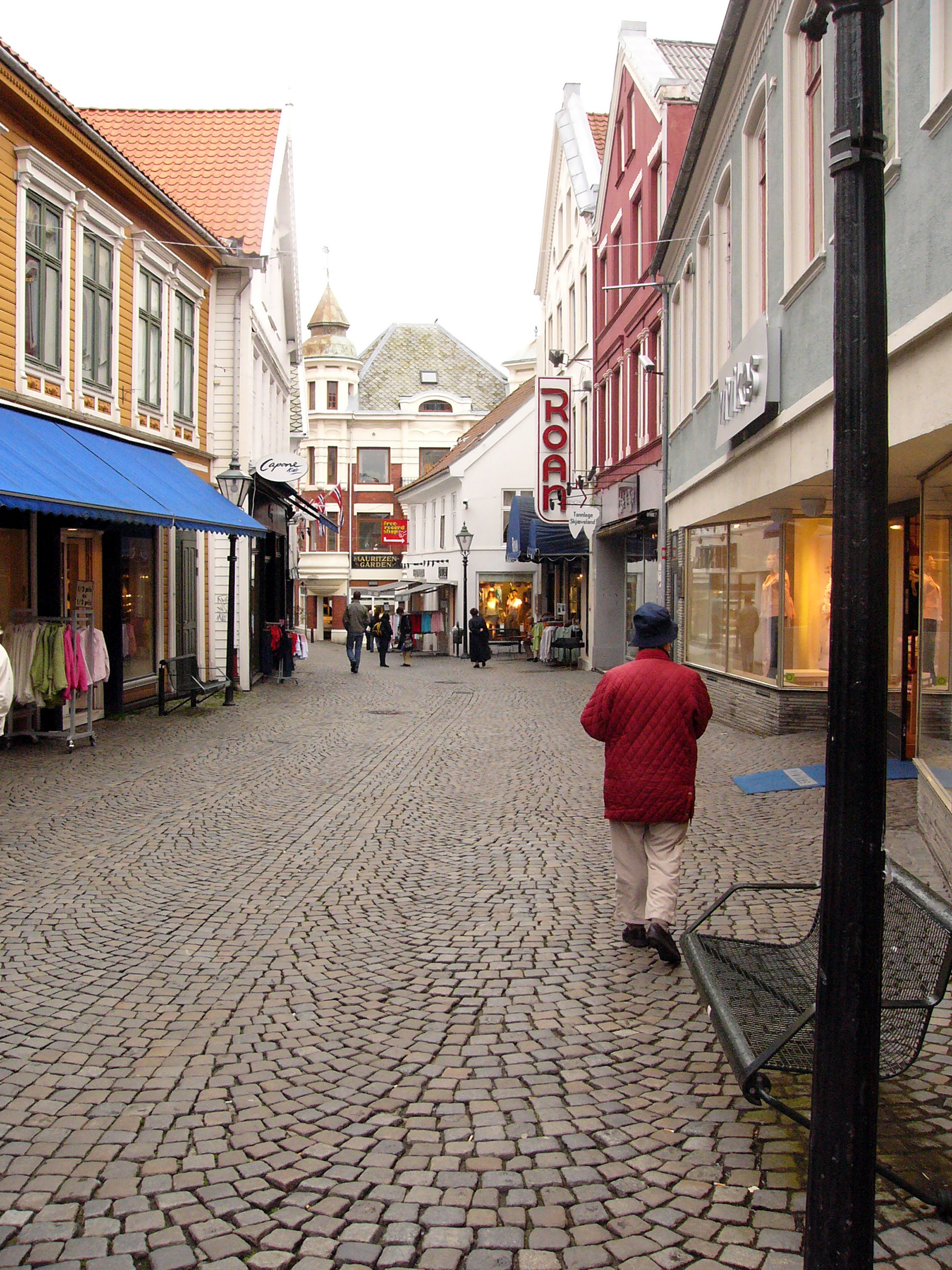 Street Kirkegata in Stavanger, Norway